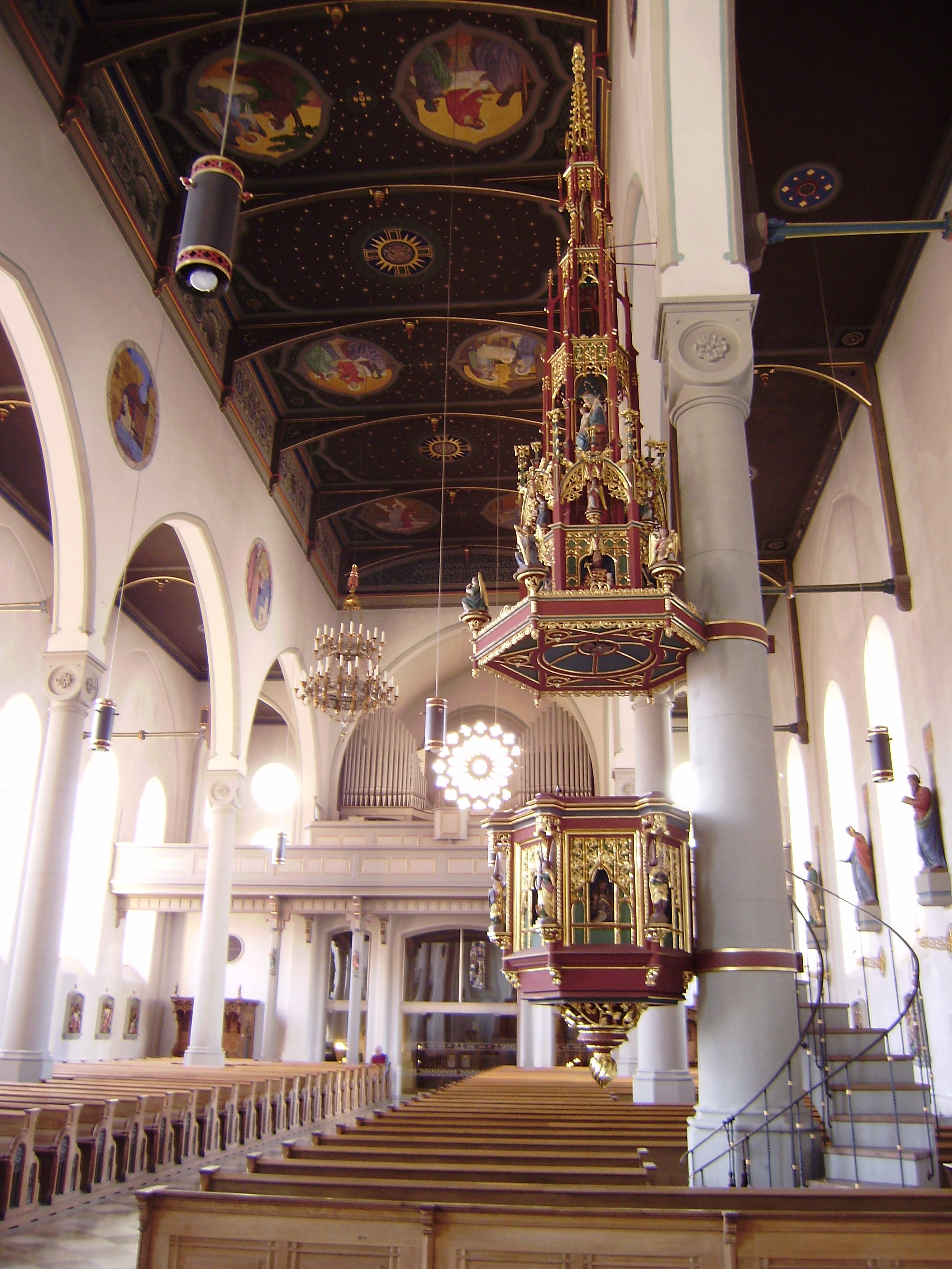 St. Peter und Paul, Oberstaufen Langhaus m Kanzel